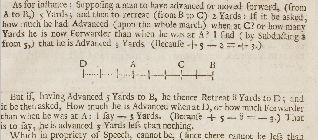 John Wallis, A treatise of algebra, both historical and practical : shewing the original, progress, and advancement thereof, from time to time, and by what steps it hath attained to the heighth at which now it is ; with some additional treatises (1685)